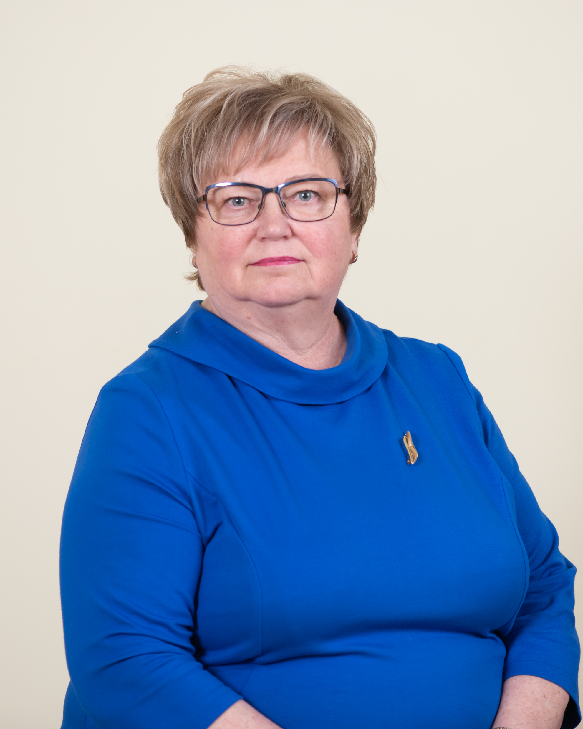 Kai Rimmel